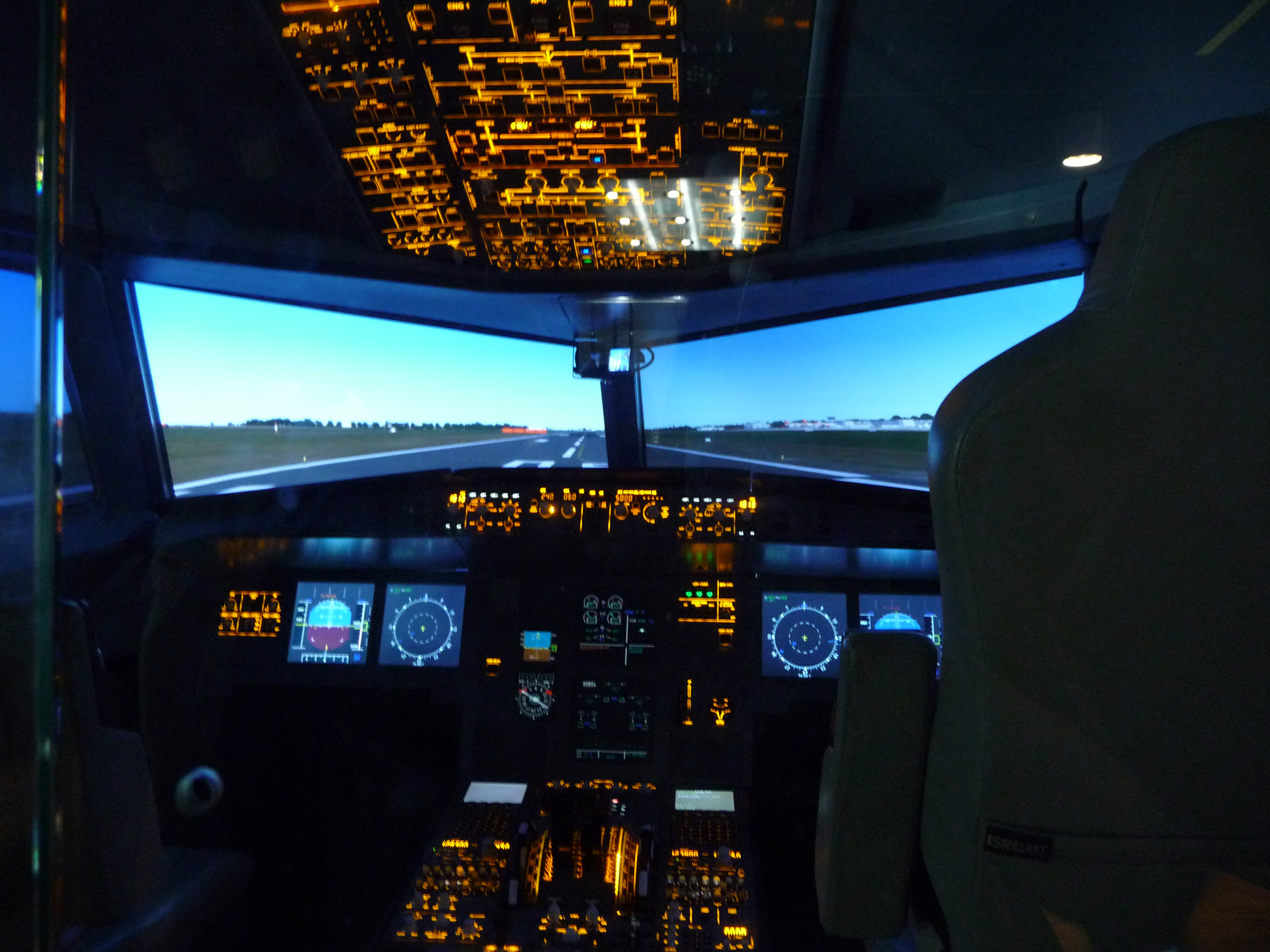 Flugsimulator Ausstellungsstück der DASA in Dortmund